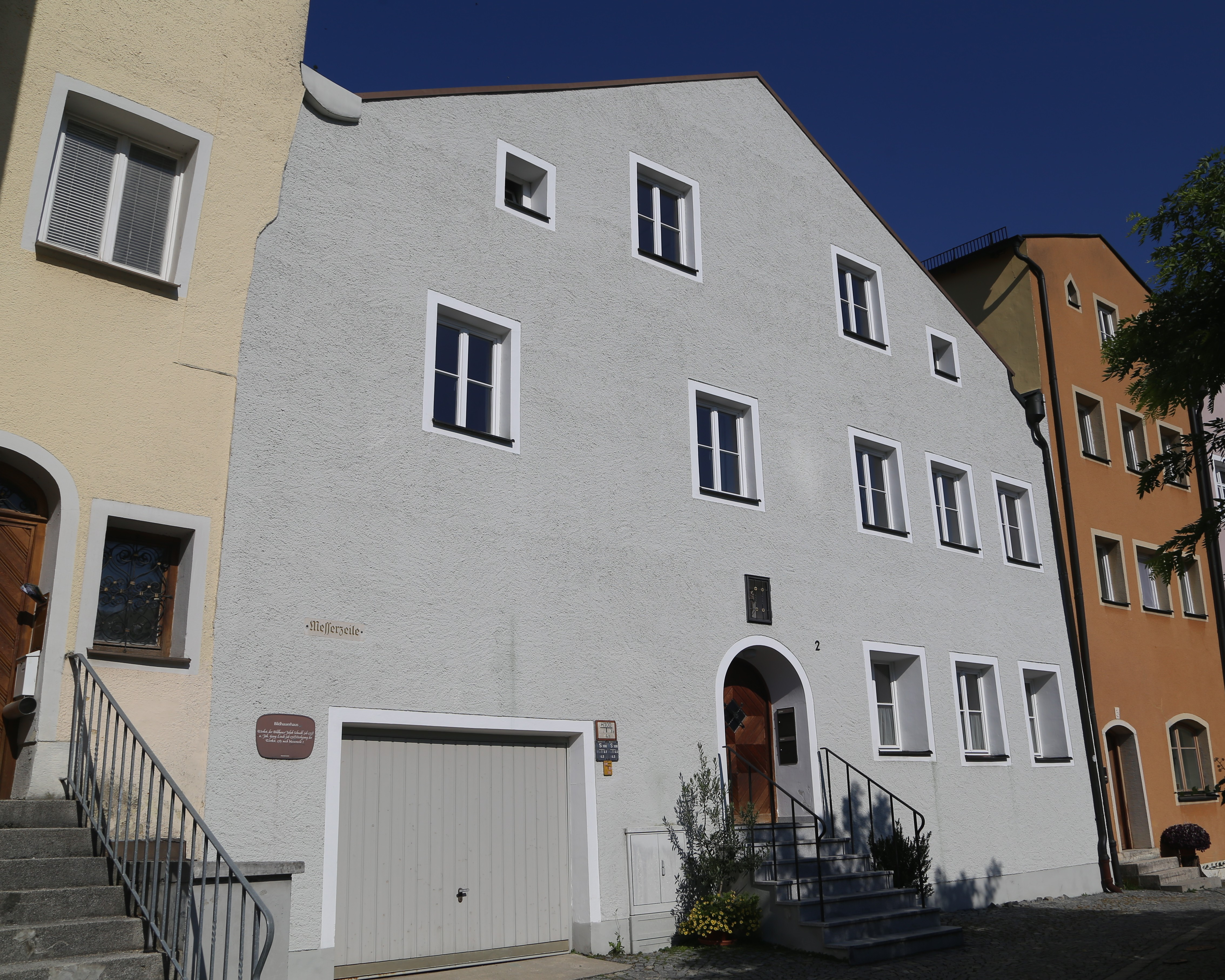 Messerzeile 2, Burghausen; Bildhauerhaus, ehemalige Werkstatt der Bildhauer Johann Georg Lindt und Thomas Jorhan; breitgelagerter zweigeschossiger Satteldachbau mit Dreiecksgiebel, 16. Jahrhundert